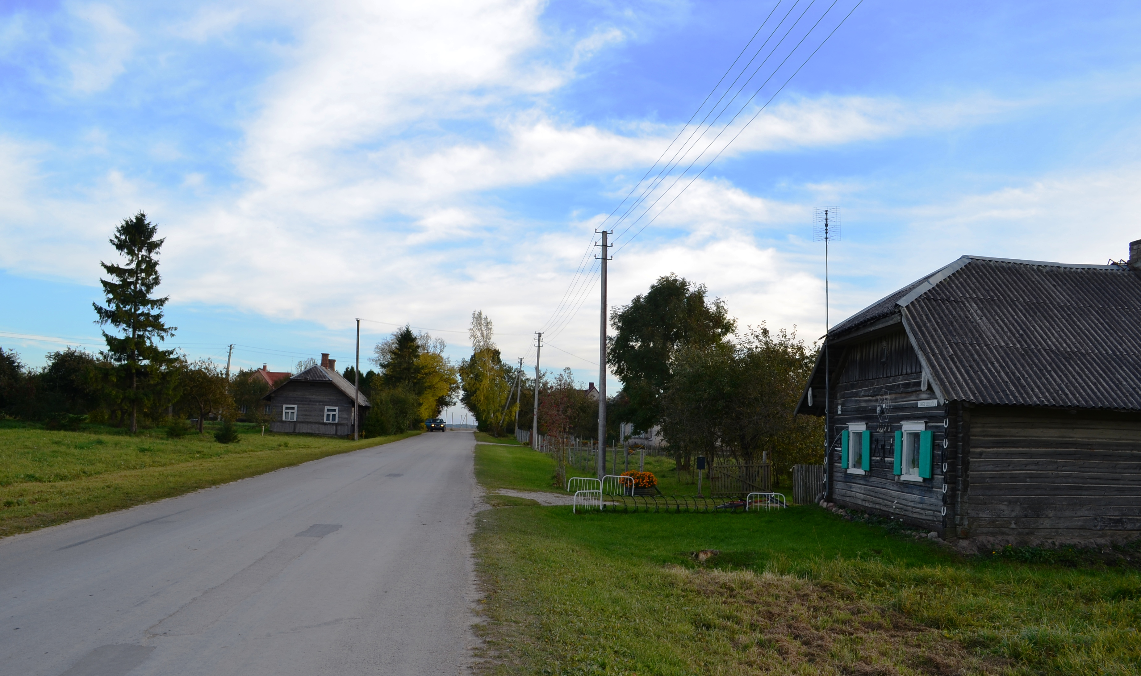 Devynduoniai, Gudžiūnų sen., Kėdainių raj.